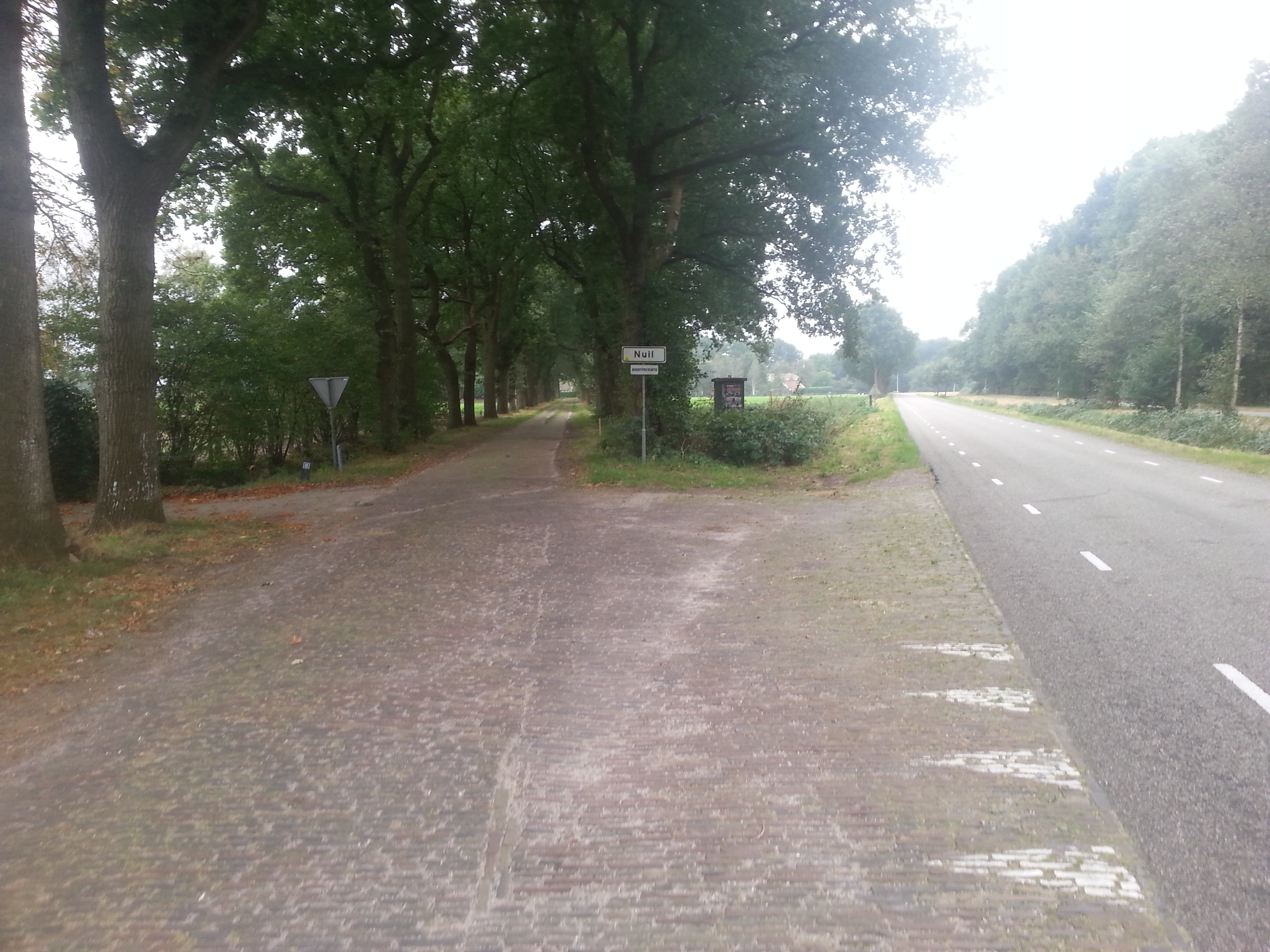 Het Nederlandse buurtschapje Nuil tijdens een fietstocht.